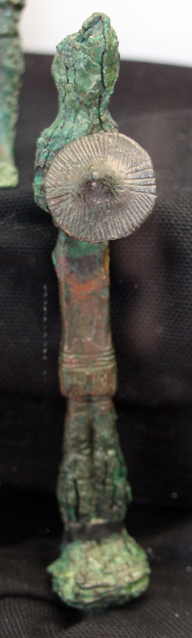 Museo archeologico nazionale G.A. Sanna - MIBAC The making of this document was supported by Wikimedia CH. (Submit your project!) For all the files concerned, please see the category Supported by Wikimedia CH. This is a photo of a monument which is part of cultural heritage of Italy.